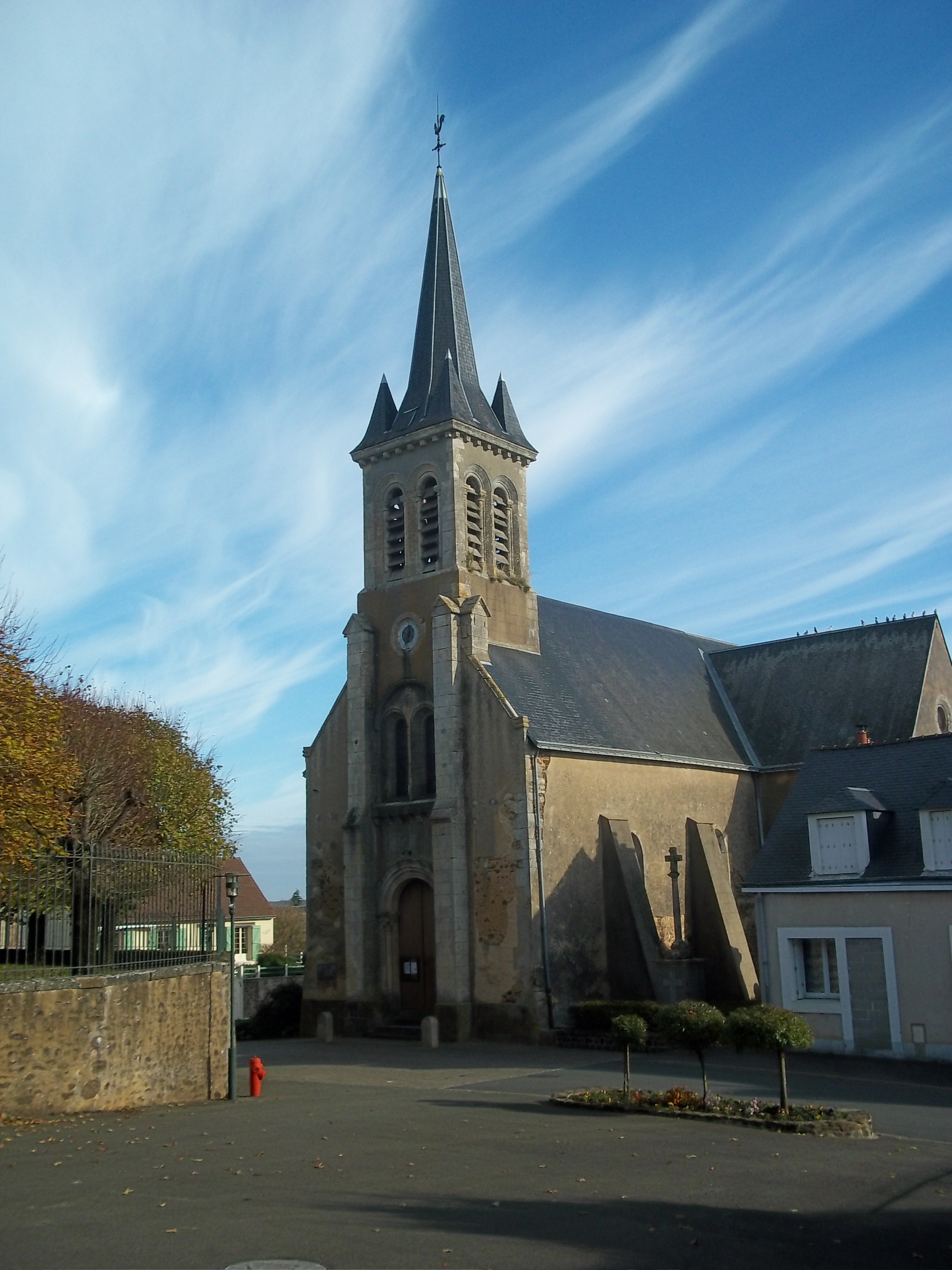 L'église